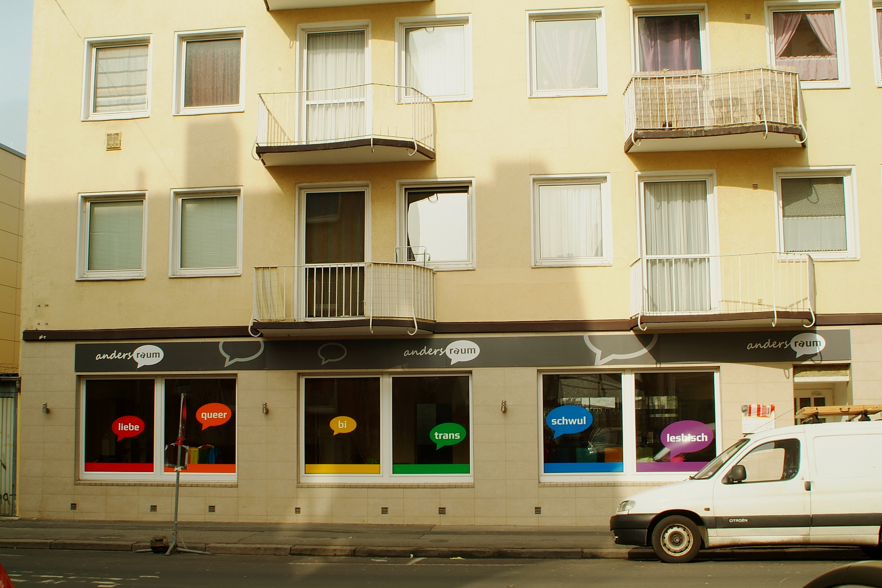 Andersraum in der Asternstraße 2, laut Faltblatt zur Eröffnung der "Ort zum Andersein". Die Aufkleber auf den Schaufenstern "liebe, queer, bi, trans, schwul" und "lesbisch" verkünden einen Ort für vielfältiges Leben in Hannover.